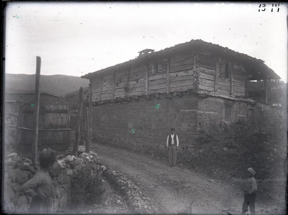 Изчезнувшее село Узеньбаш, 1925 год.